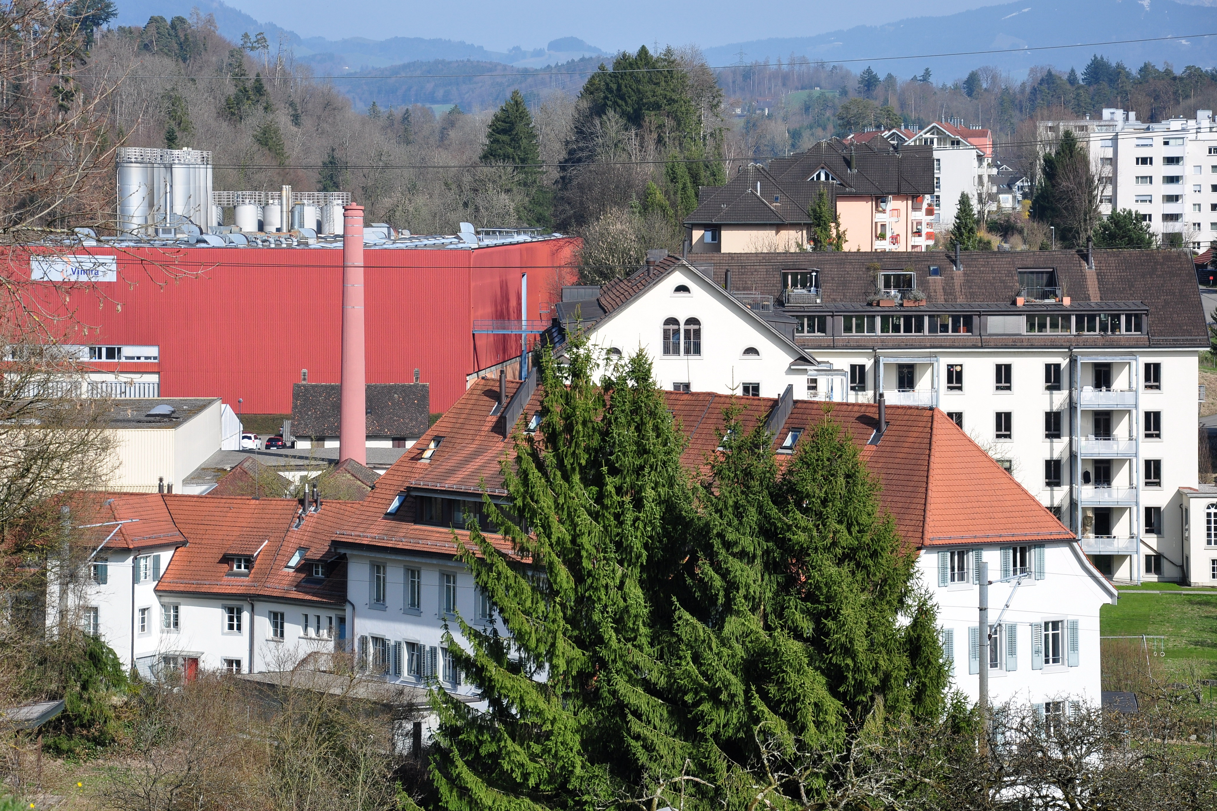 Stadtbach stream, Vinora and former Spinnerei Brändli industry buildings in Jona (Switzerland), as seen from Meienberg.